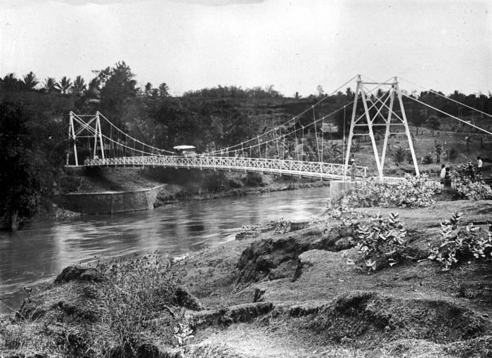 Repronegatief. Een kabelbrug over de rivier Brantas bij Kesamben, residentie Kediri, Oost-Java